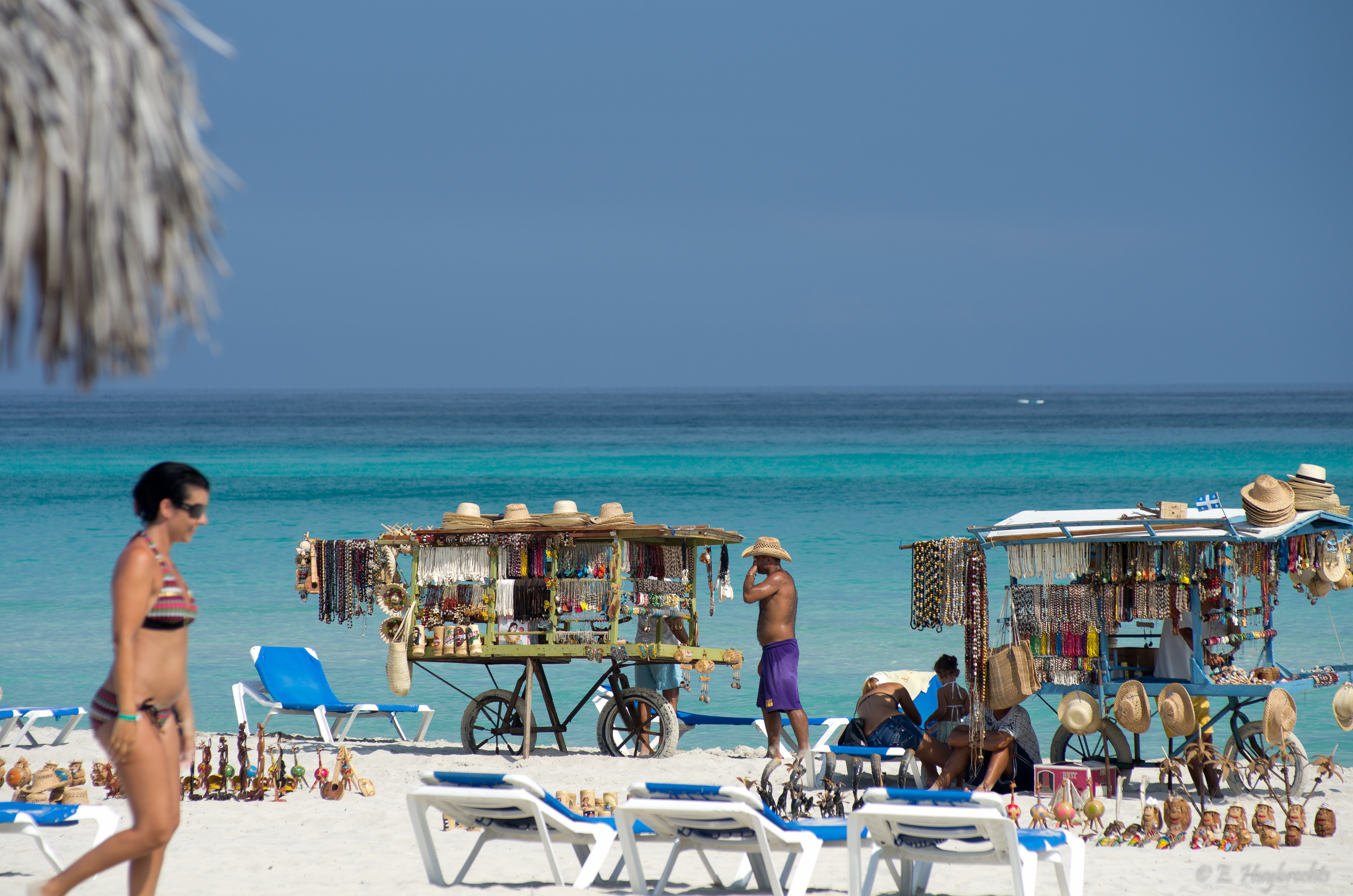 Varadero's beach